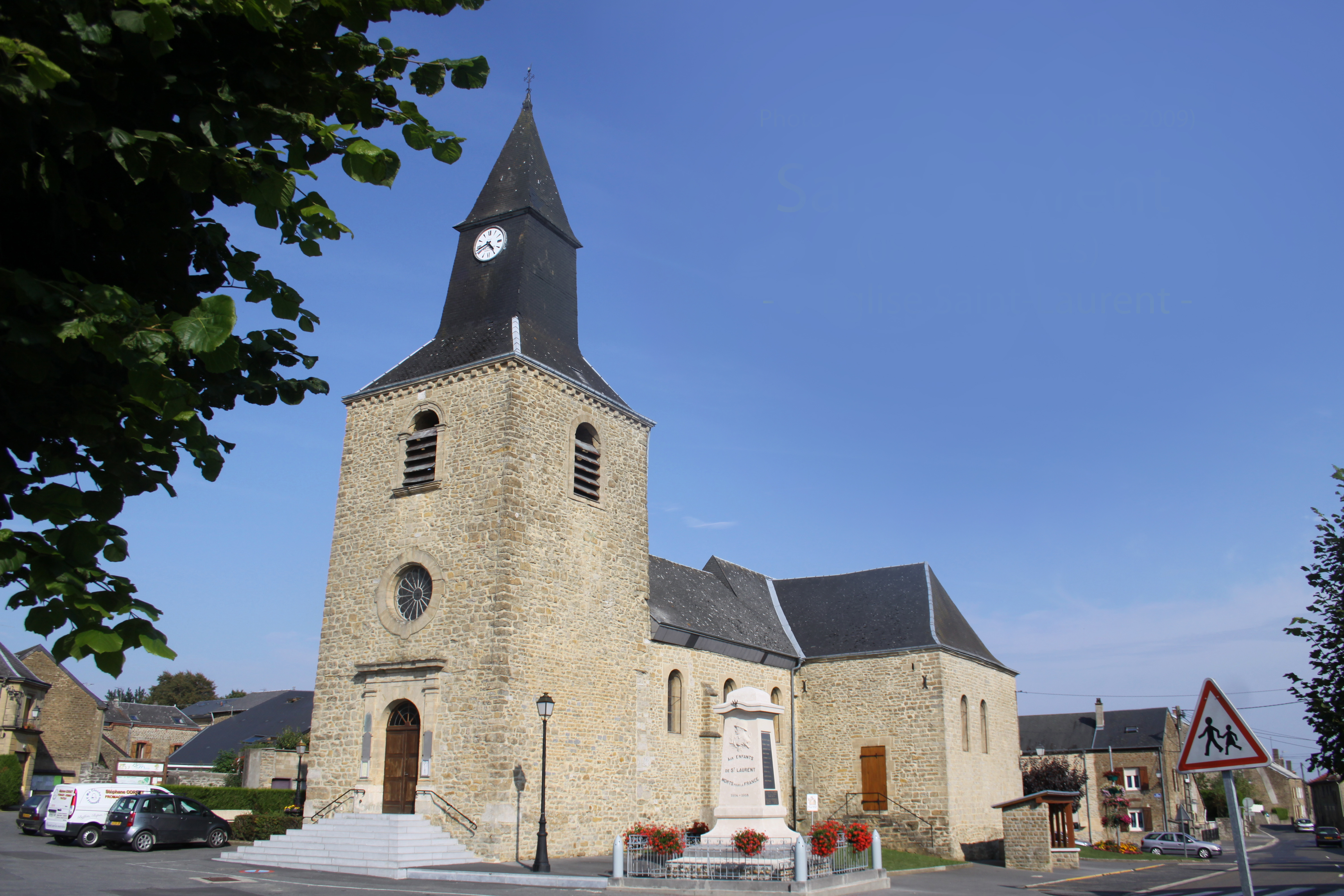 Village Ardennais